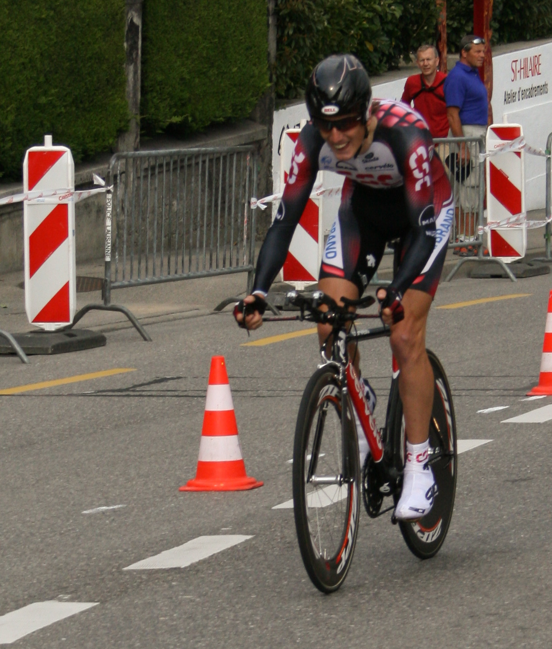 Andy Schleck prologue du Tour de Romandie 2007